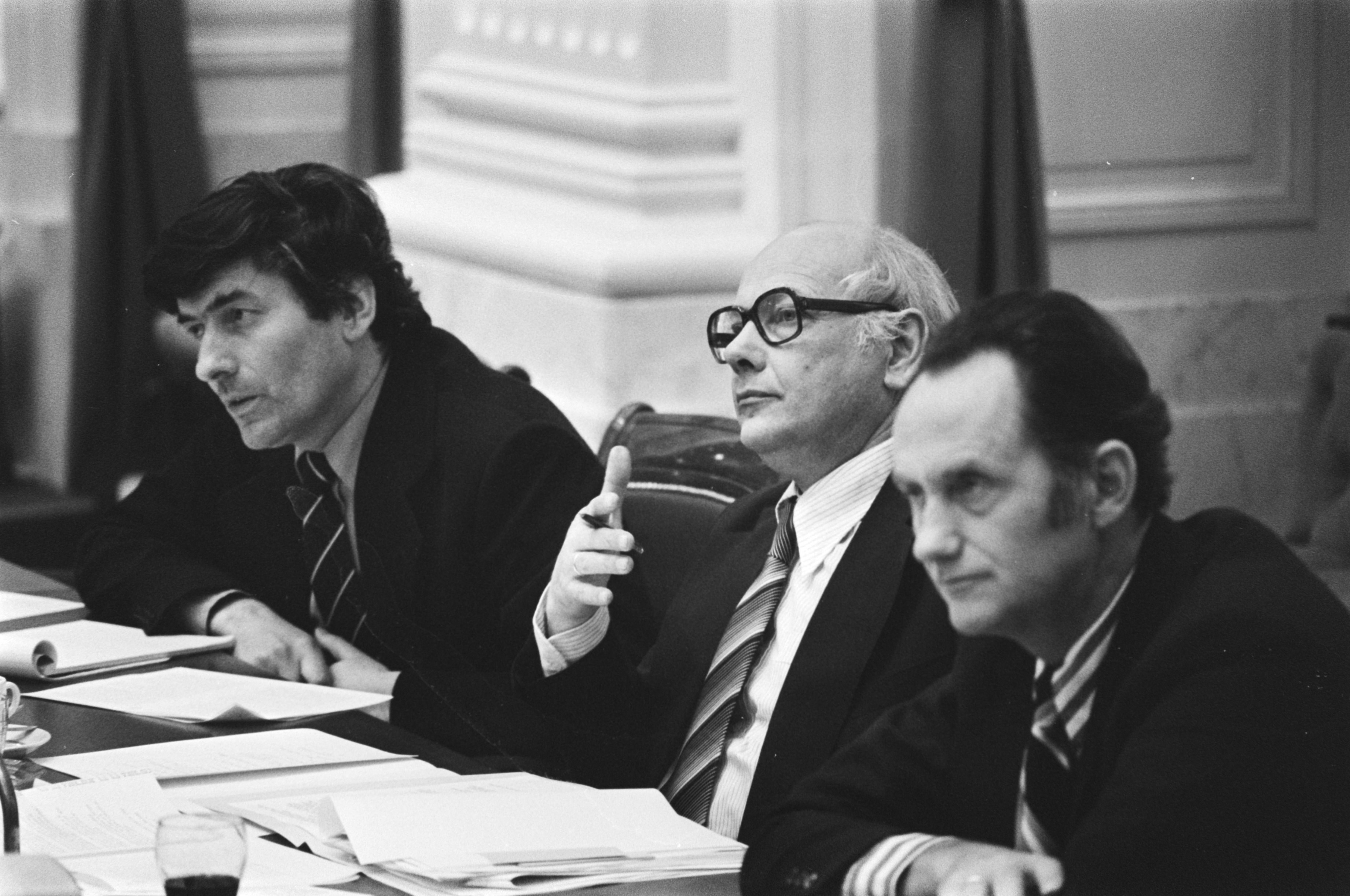 Collectie / Archief : Fotocollectie Anefo Reportage / Serie : Tweede Kamer debat over problemen Nederhorst-concern Beschrijving : V.l.n.r. Lubbers (KVP), Den Uyl (PvdA) en Boersma (CDA) Datum : 8 april 1976 Locatie : Den Haag, Zuid-Holland Trefwoorden : ministers, parlementaire debatten, politici, politiek Persoonsnaam : Boersma, Jaap, Lubbers, Ruud, Uyl, Joop den Instellingsnaam : Tweede Kamer Fotograaf : Fotograaf Onbekend / Anefo Auteursrechthebbende : Nationaal Archief Materiaalsoort : Negatief (zwart/wit) Nummer archiefinventaris : bekijk toegang 2.24.01.05 Bestanddeelnummer : 928-5120